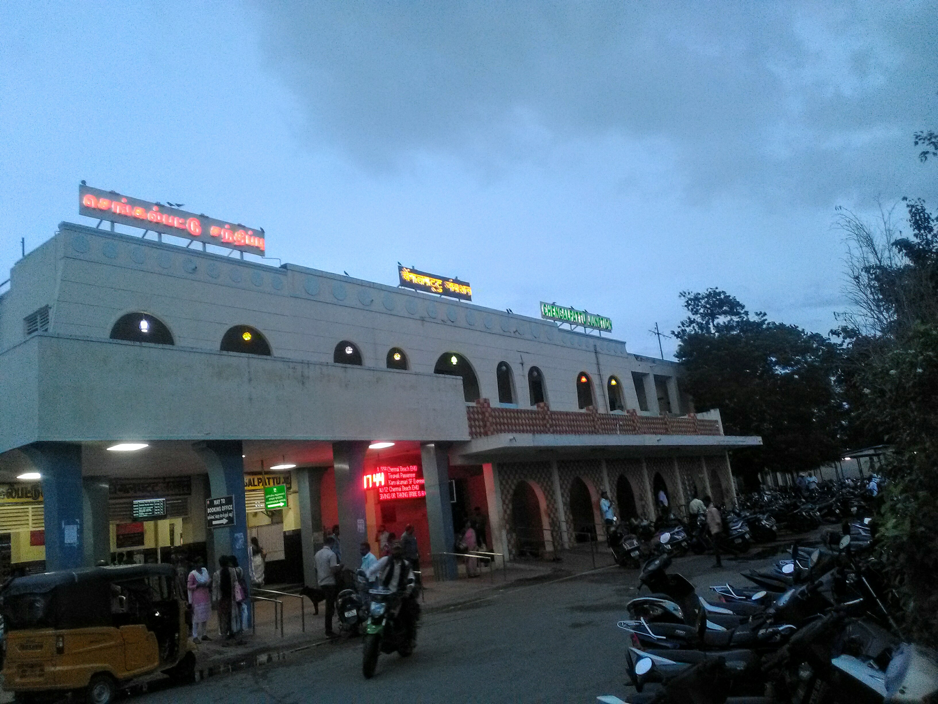 செங்கல்பட்டு இரயில் நிலையத்தில் எடுக்கப்பட்ட புகைப்படம் ..